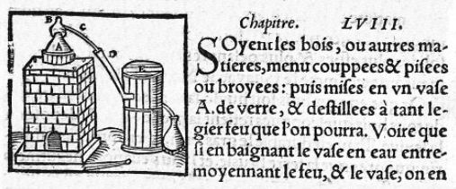 Appareil à distiller avec refroidissement dans un tonnelet d'eau fraîche. Trésor des remèdes secrets, Conrad Gesner